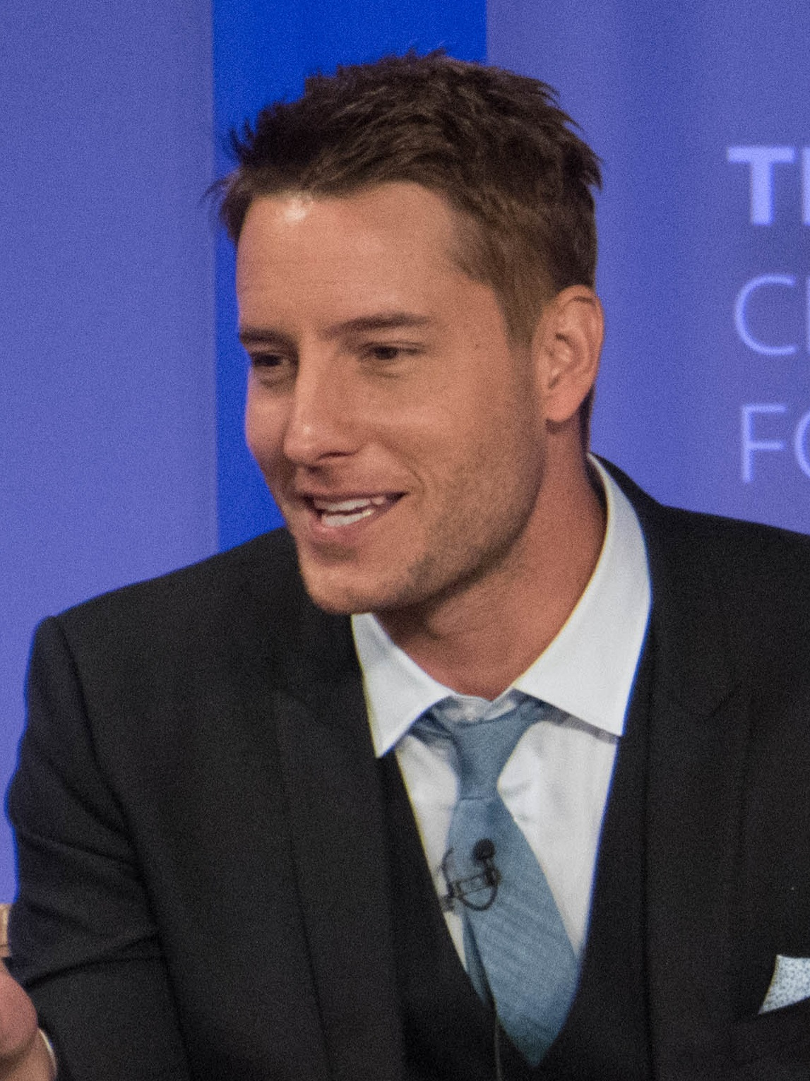 actor Justin Hartley at the 2017 paleyfest